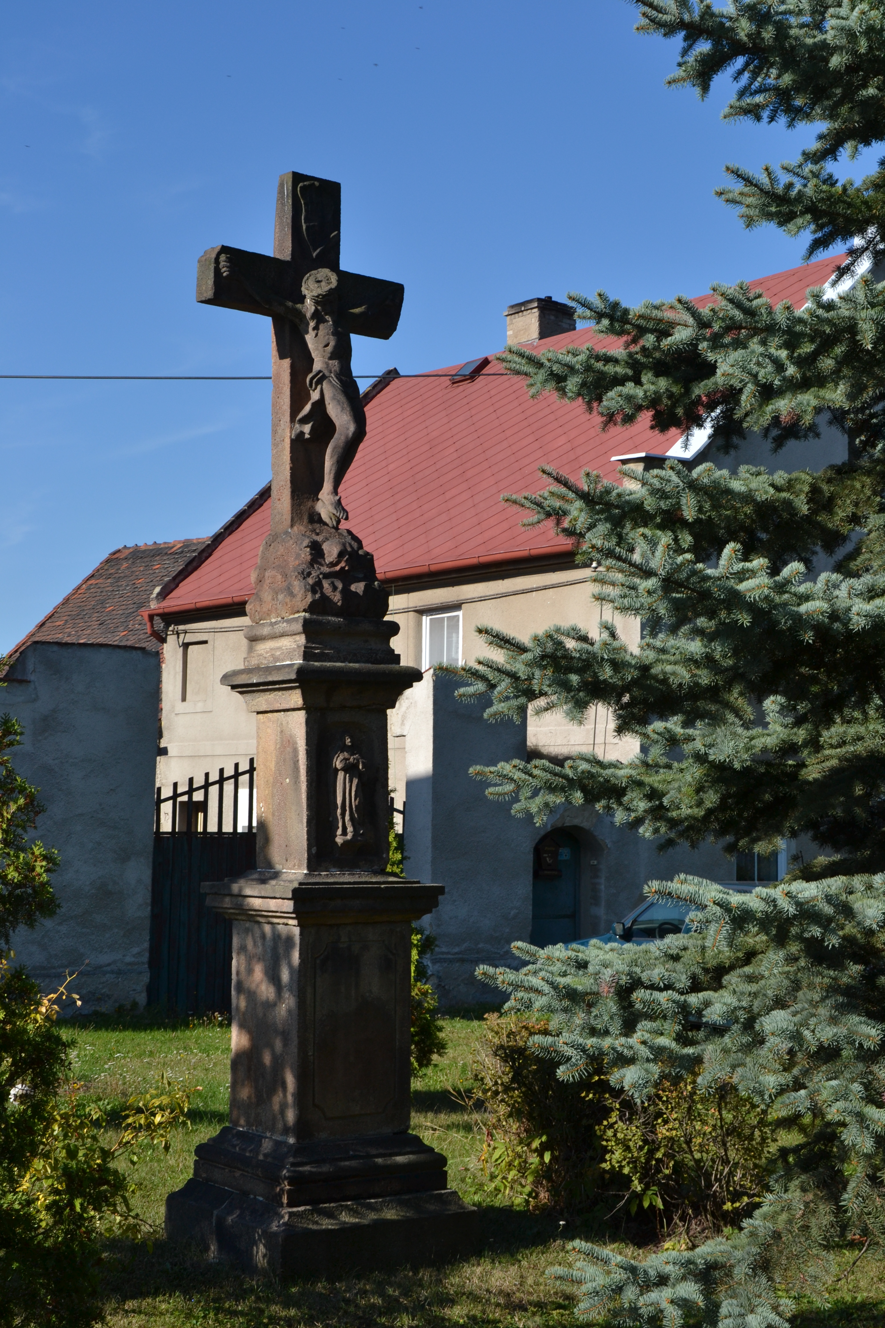 Krucifix (Droužkovice), Droužkovice